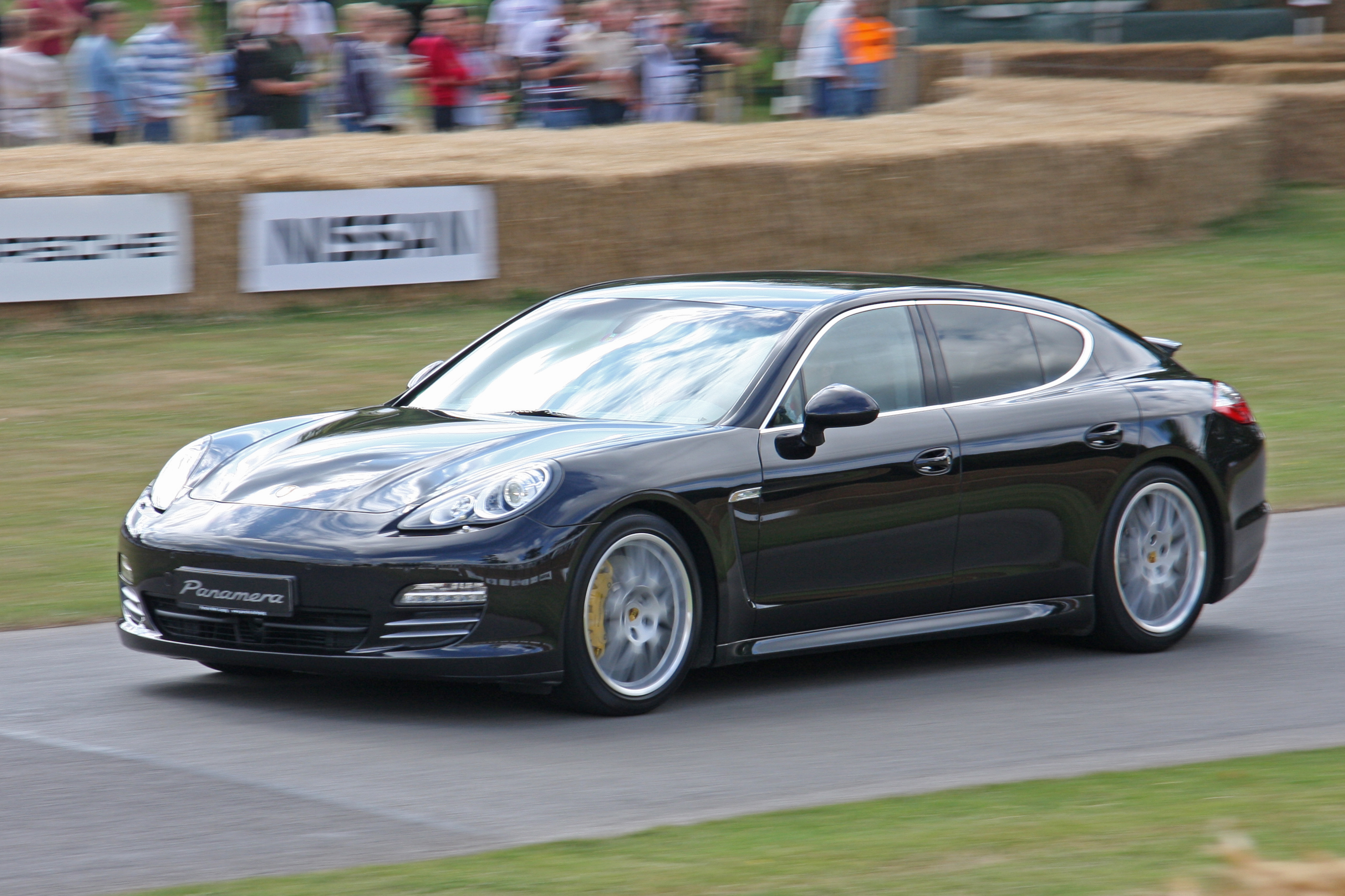 Goodwood 2009